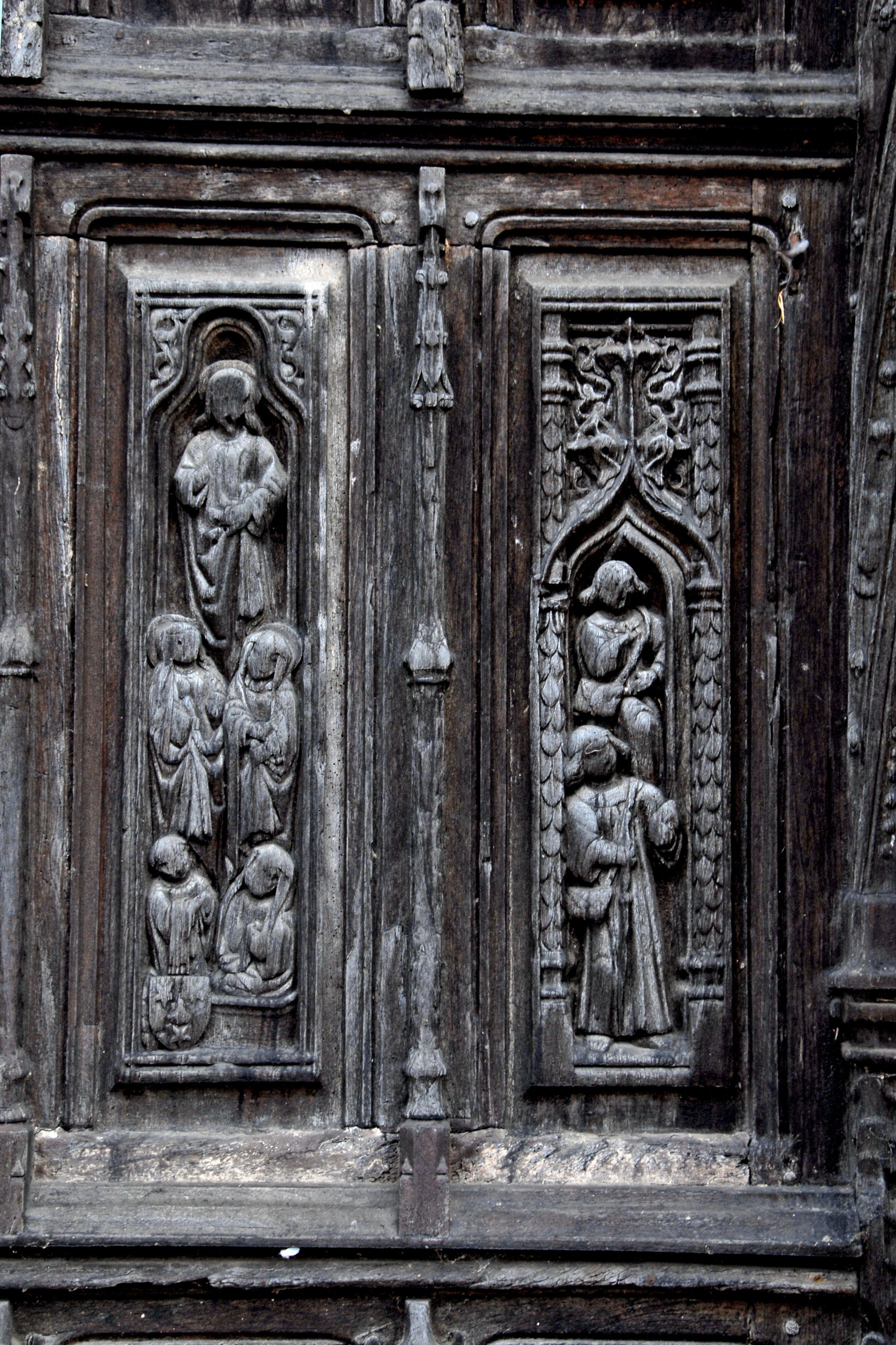 St-Thibault de Saint-Thibault, Nordportal, Detail Türblatt